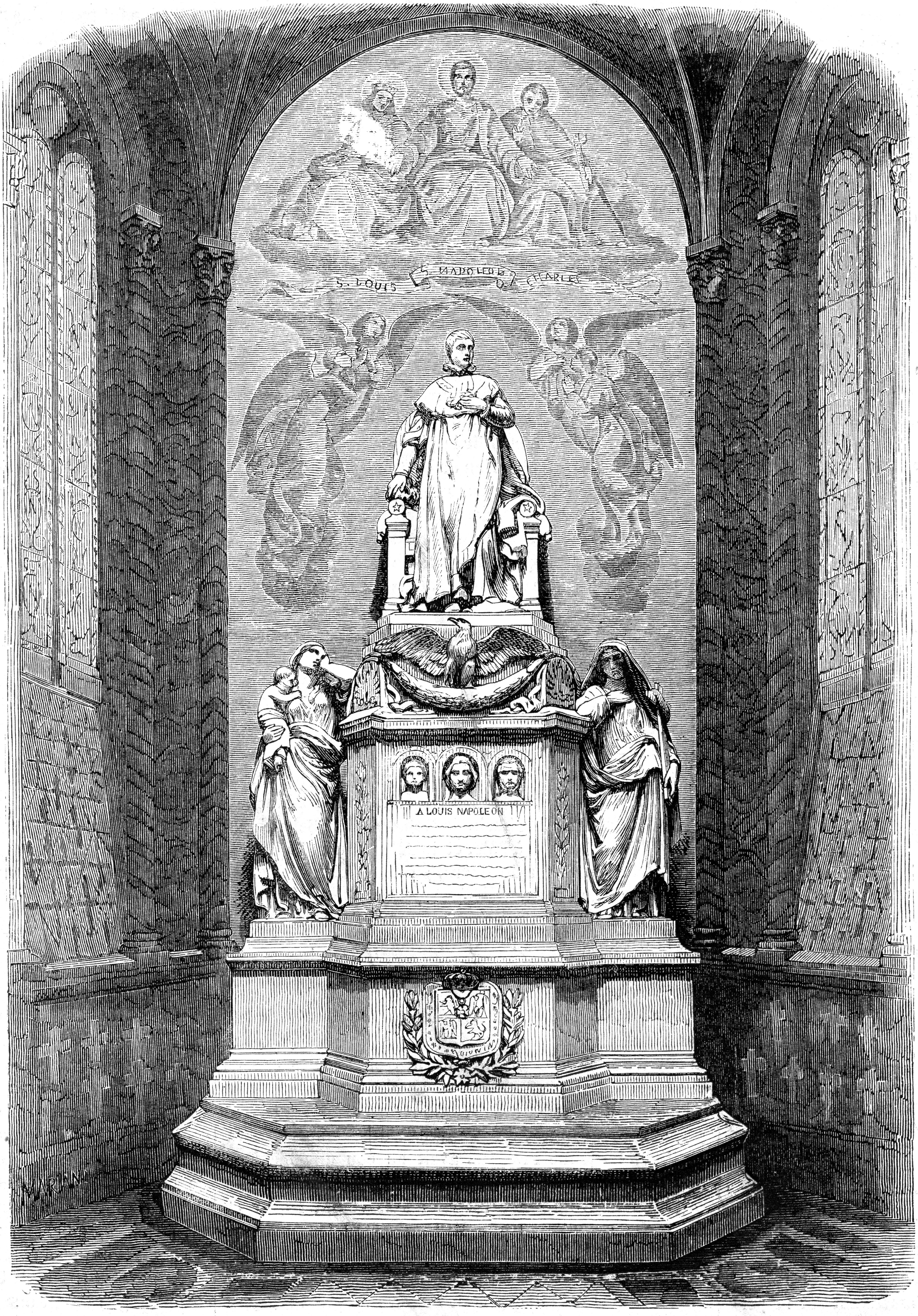 L'Illustration 1862 gravure du monument Louis Bonaparte, sculpteur Louis Petitot, église Saint-Leu-la-Forêt